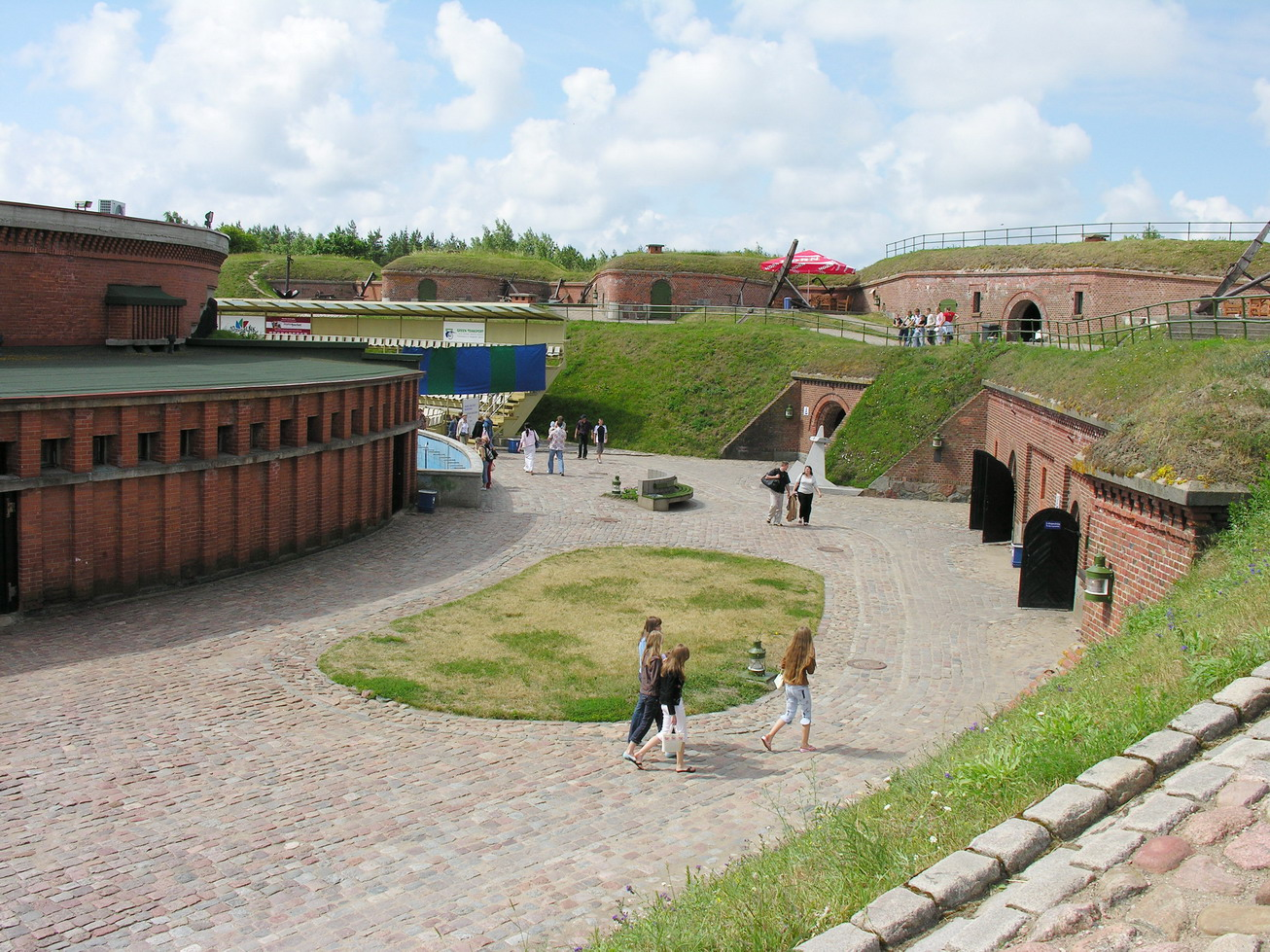 Lietuvos jūrų muziejus Foto: Algirdas, 2006 m. birželio 29 d.